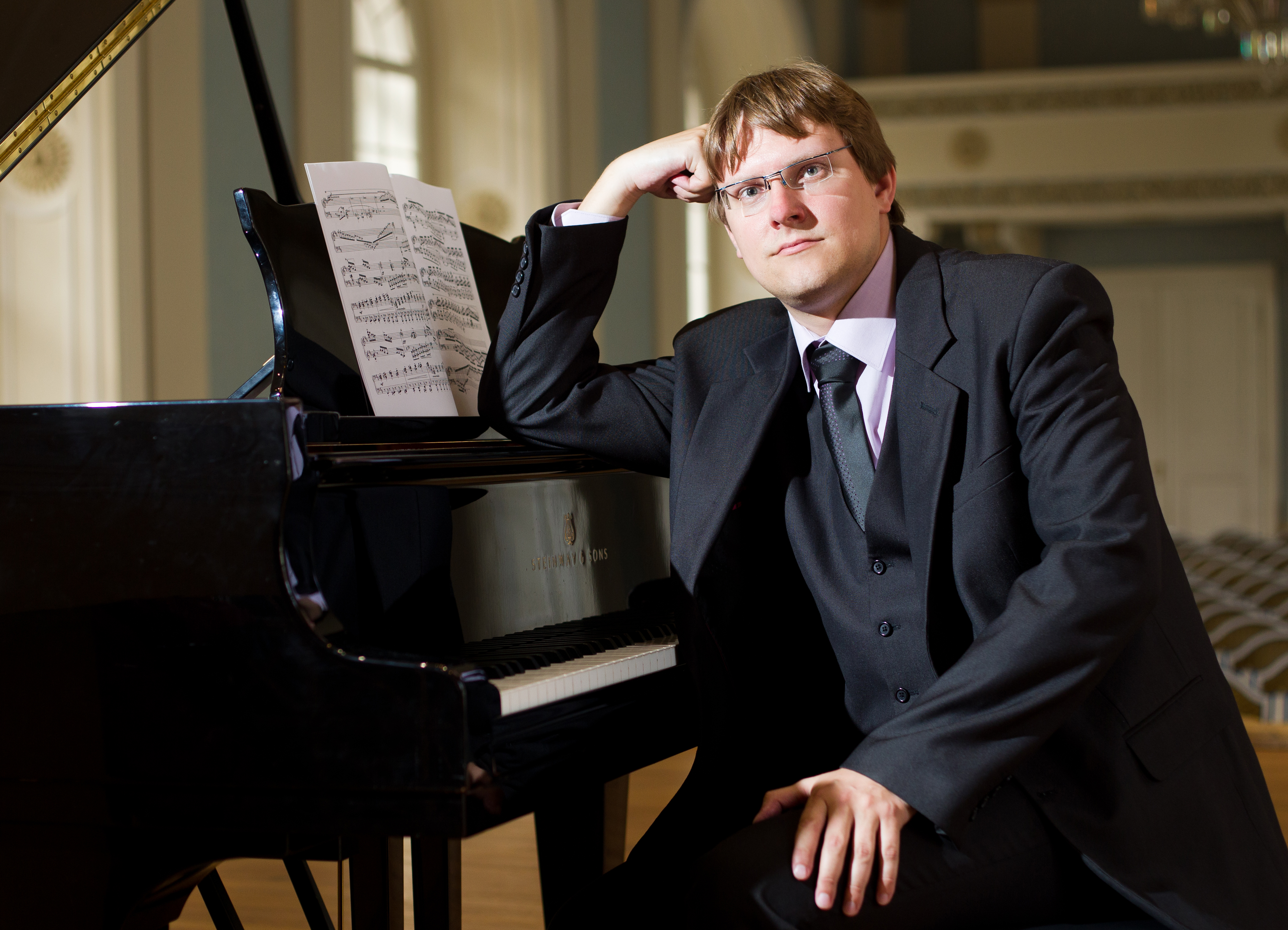 Jan Dušek